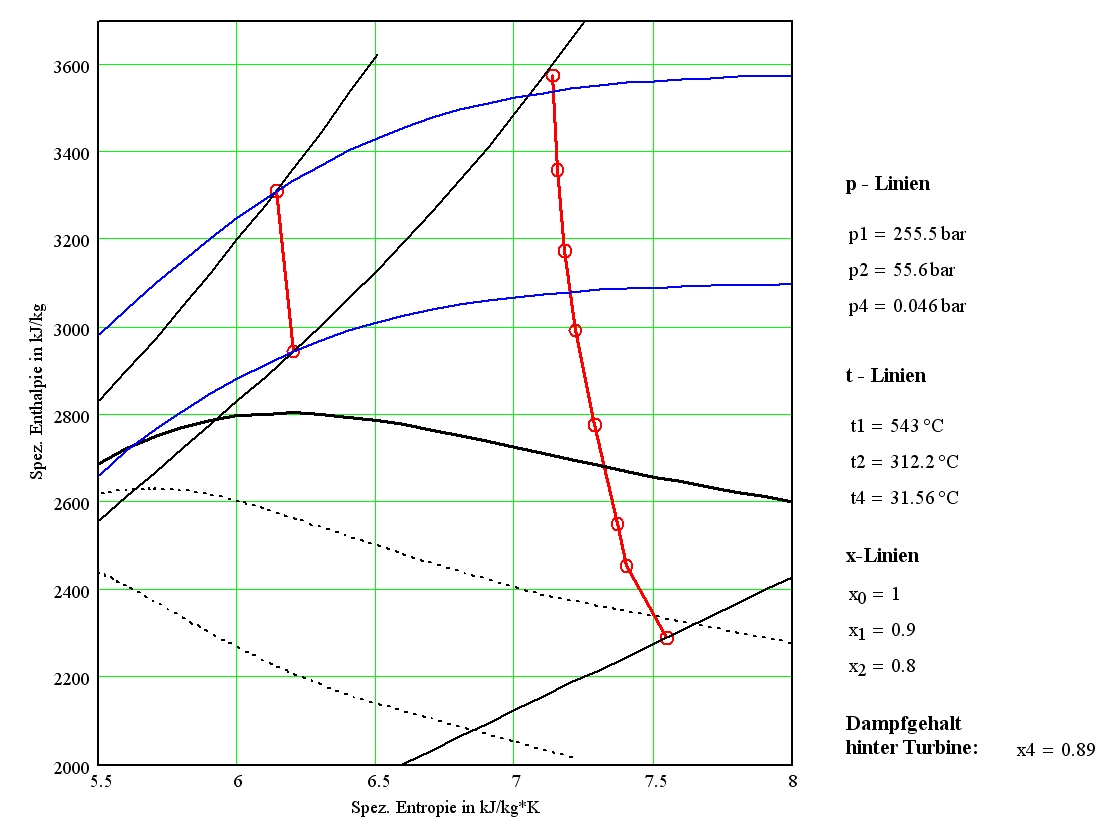 KW Staudinger h-s-Dia